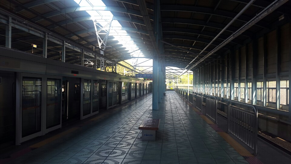 상록수역 플랫폼